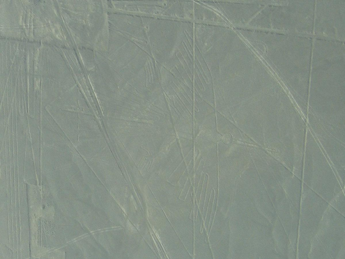 Nasca (Peru), Condor, August 2007